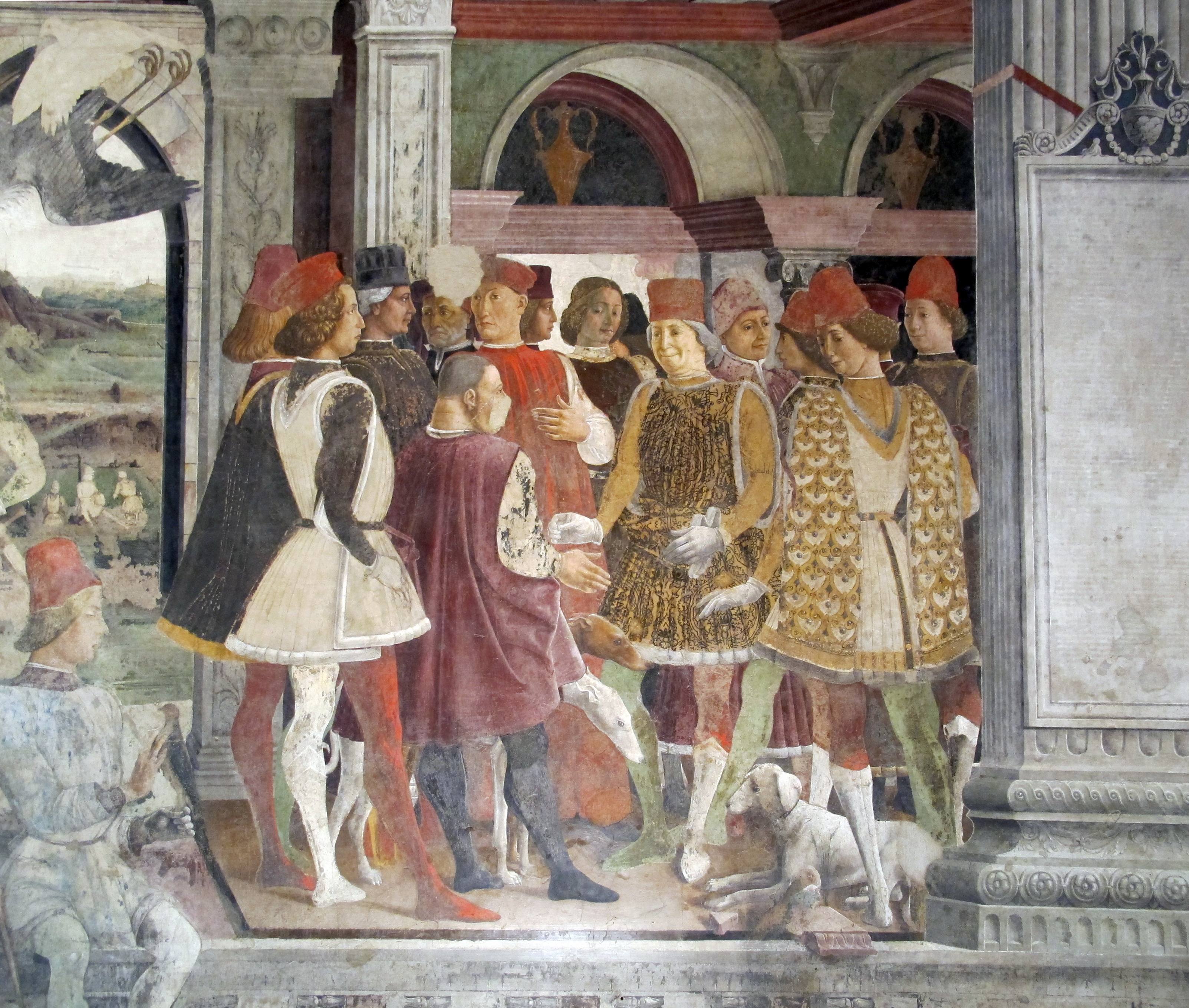 Palazzo Schifanoia This is a photo of a monument which is part of cultural heritage of Italy.